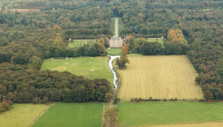 Kasteel Eerde